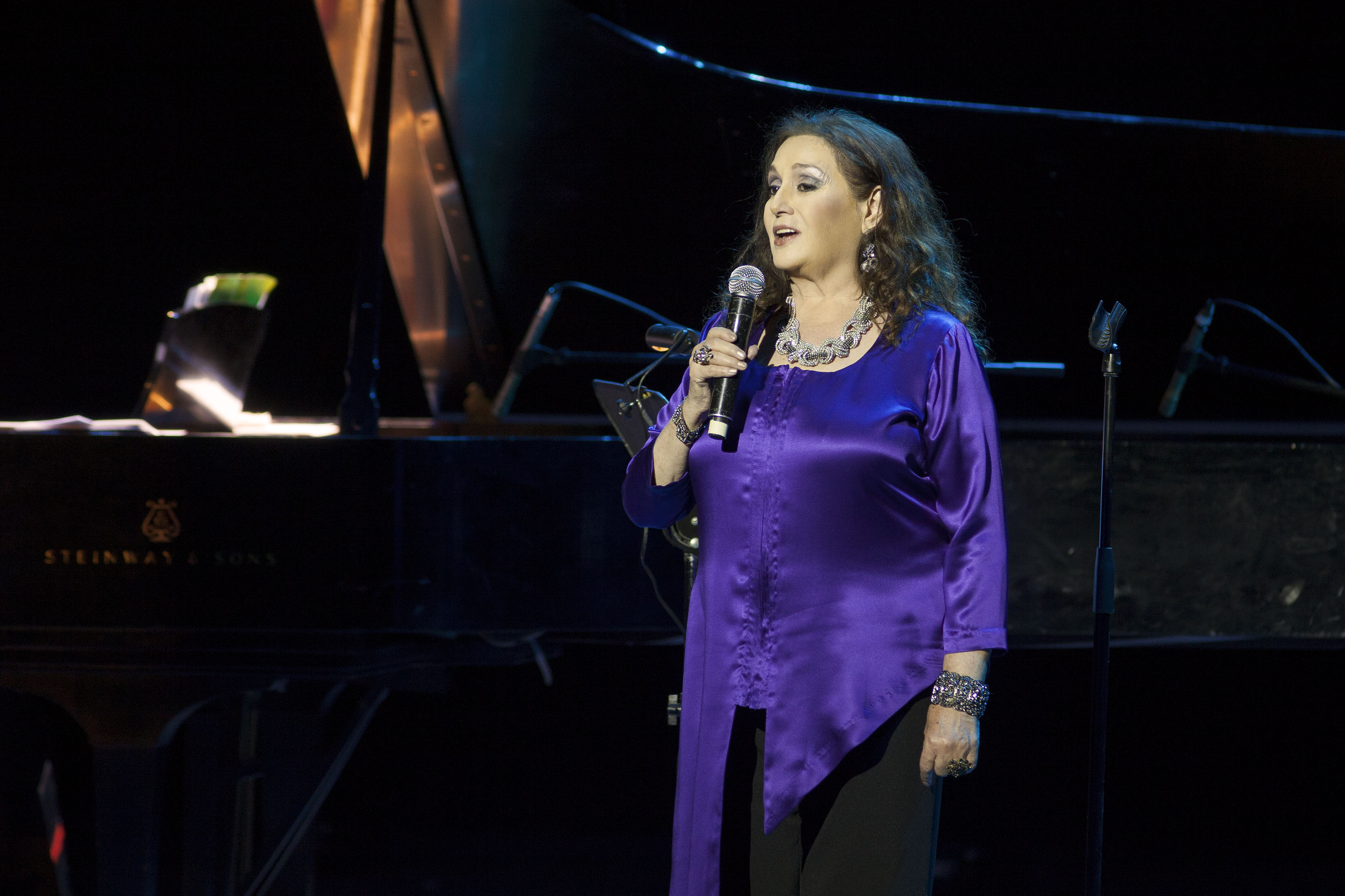 Jueves 21 de Mayo. En el Teatro de la Ciudad Esperanza Iris la cantante Margie Bermejo ofreció el concierto Los Matices del Amor. Celebración 50, bajo la dirección musical del maestro Dmitri Dudin. Foto: Antonio Nava / Secretaría de Cultura Ciudad de México.